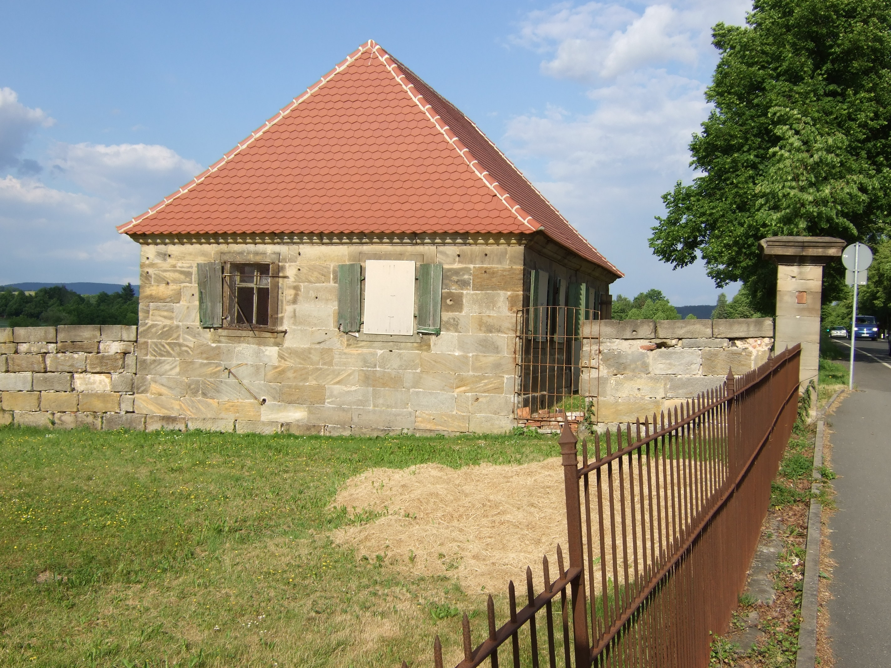 Gärtnerhäuschen Colmdorf